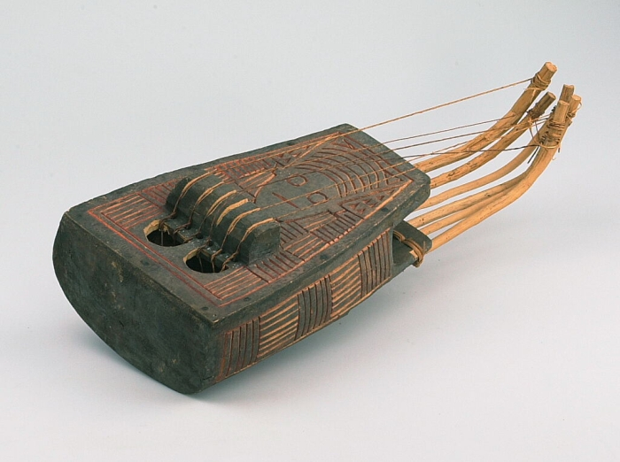 Deze samengestelde boog ('pluriarc') bevat 5 houten bogen om de 5 snaren aan te bevestigen. Het houten klanklichaam is voorzien van een kam waarover de snaren lopen. Vlak onder de kam bevinden zich twee klankgaten. Het klanklichaam is versierd met ingekerfde geometrische patronen. (Dit exemplaar ziet er ongebruikt uit, en is mogelijk voor toeristen gemaakt. Voor een identieke pluriarc, zie A-10433.)